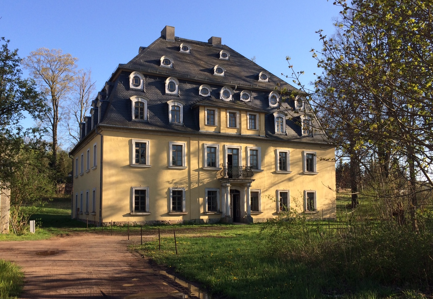 Hauptfassade Schloss Burkersdorf